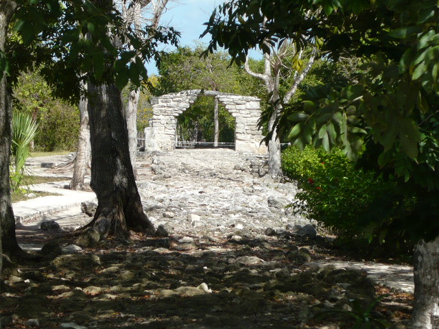 Arco maya en un sacbé, a la entrada de la Plaza Principal en San Gervasio, Cozumel, Quintana Roo.